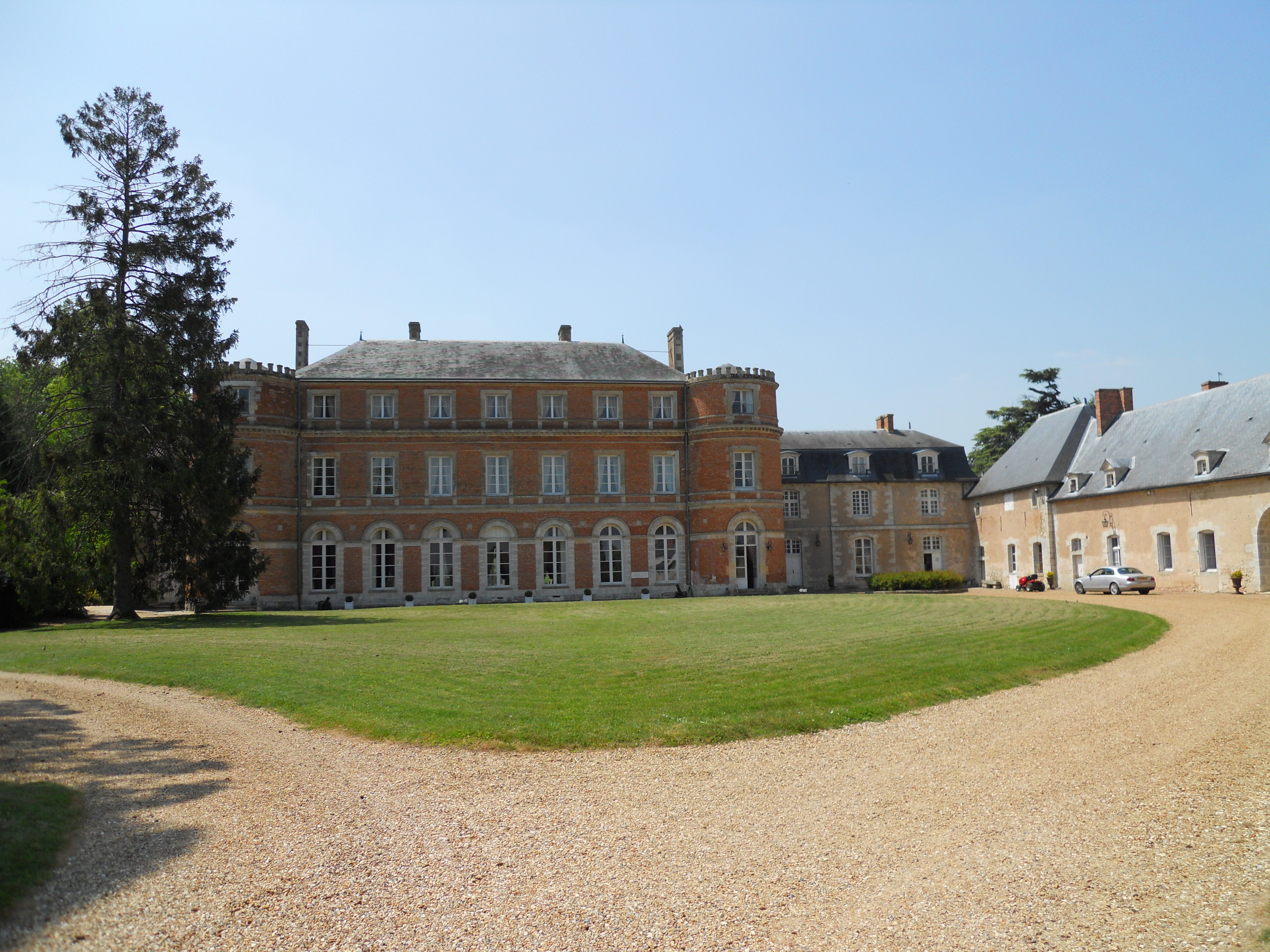 Château de Denonville, (Inscrit, 1976) .